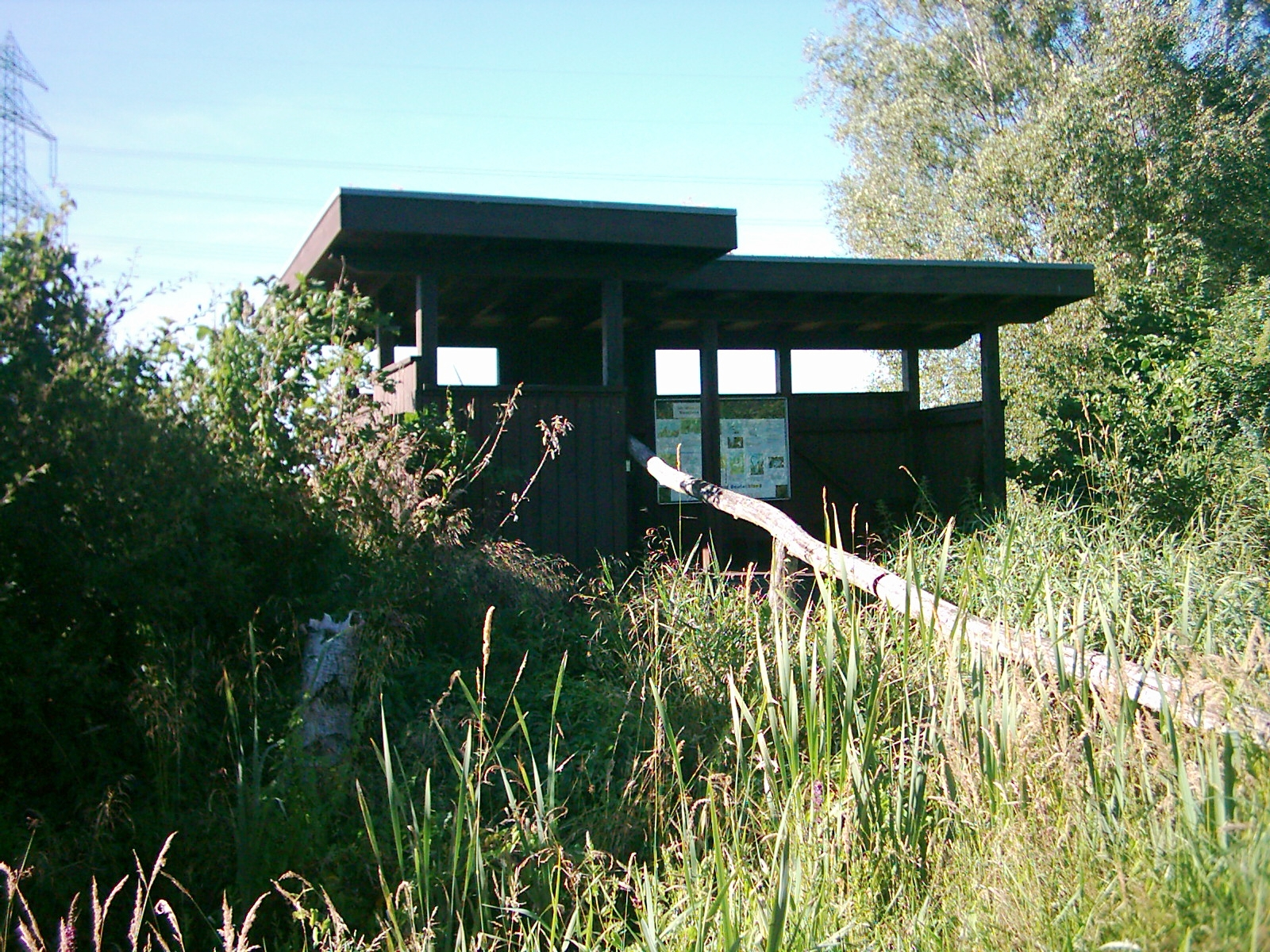 Beobachtungsstand des Naturschutzbund Deutschland (NABU) im Moorgürtel, einem Naturschutzgebiet im Süden Hamburgs.